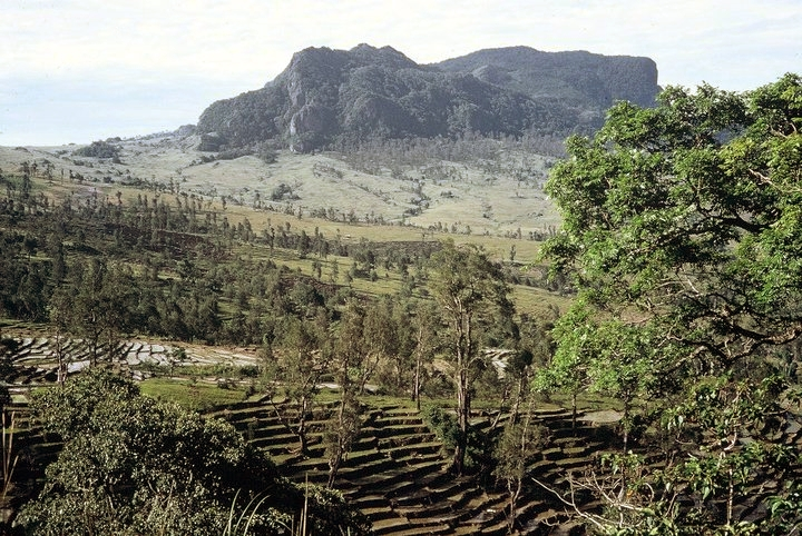 A montanha chamada "Mundo Perdido"